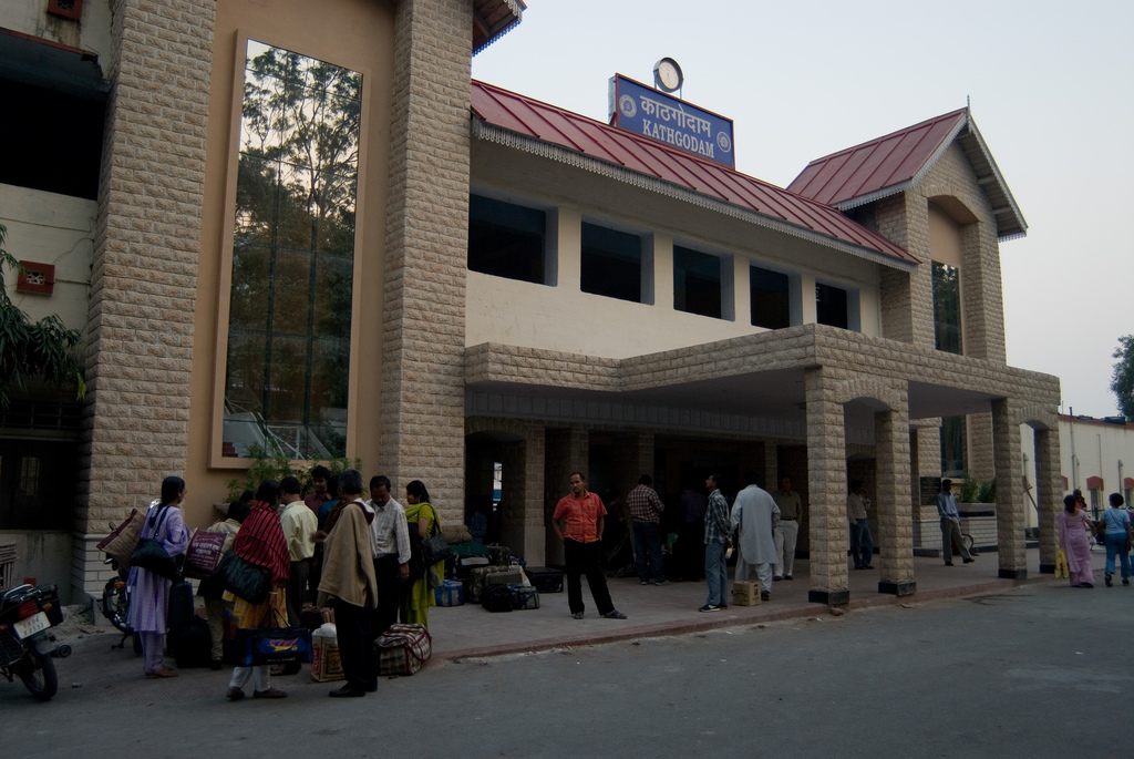 Залізнична станція міста Катхґодам